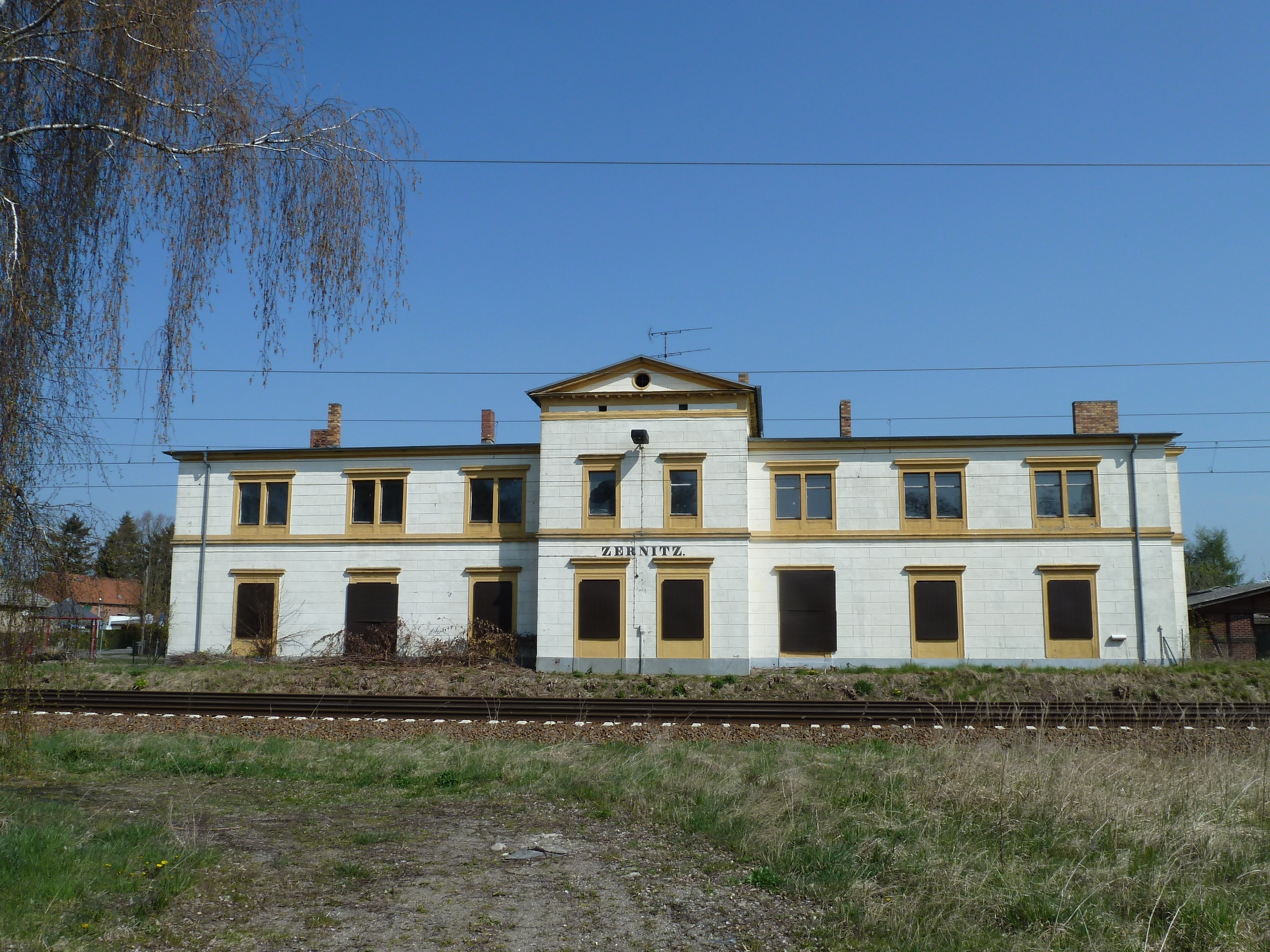 Denkmalgeschütztes Empfangsgebäude des ehemaligen Bahnhofs Zernitz